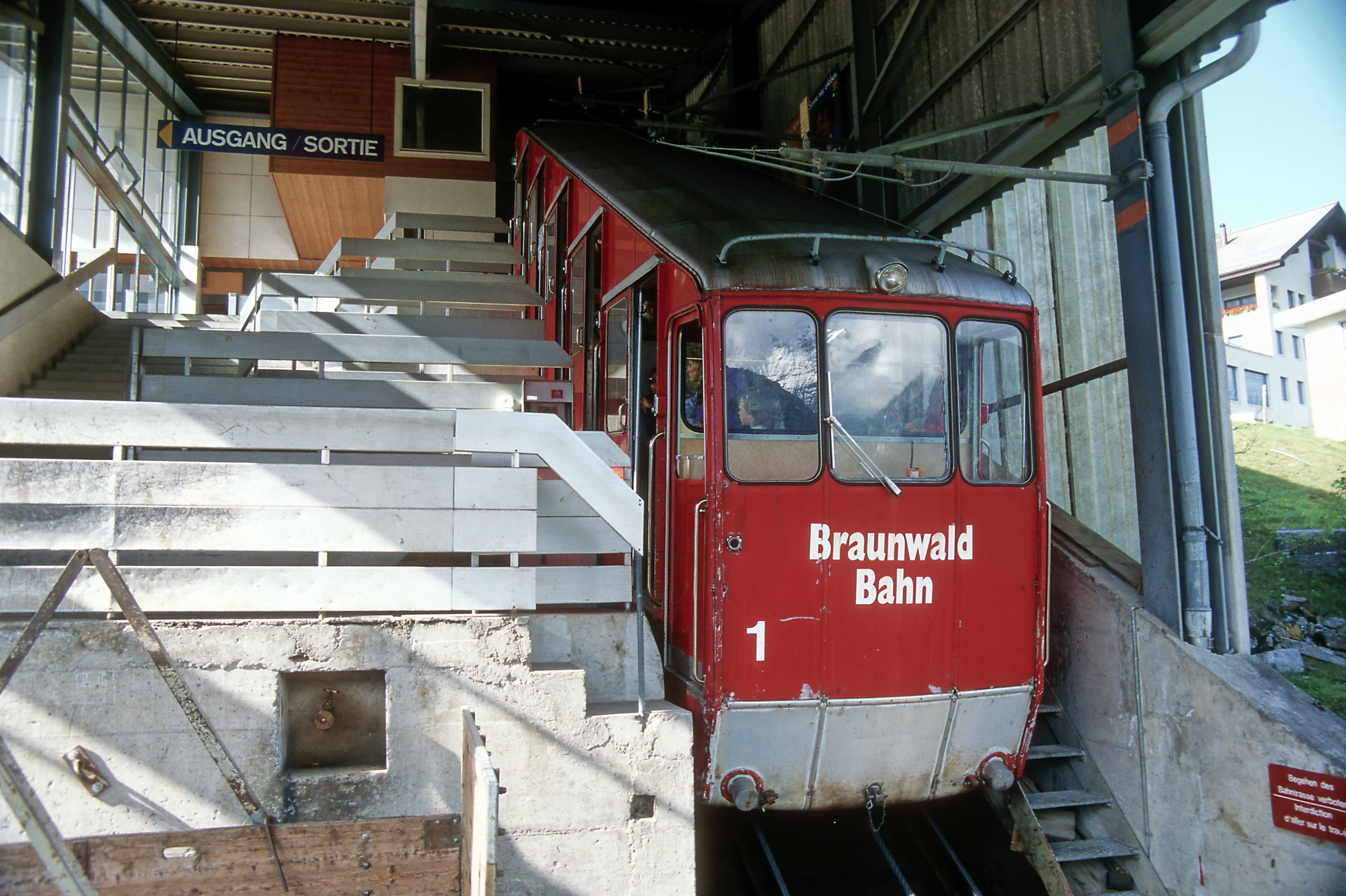 Wagen 1 der Braunwaldbahn von 1967 im letzten Betriebsjahr am Bahnsteig der Bergstation.